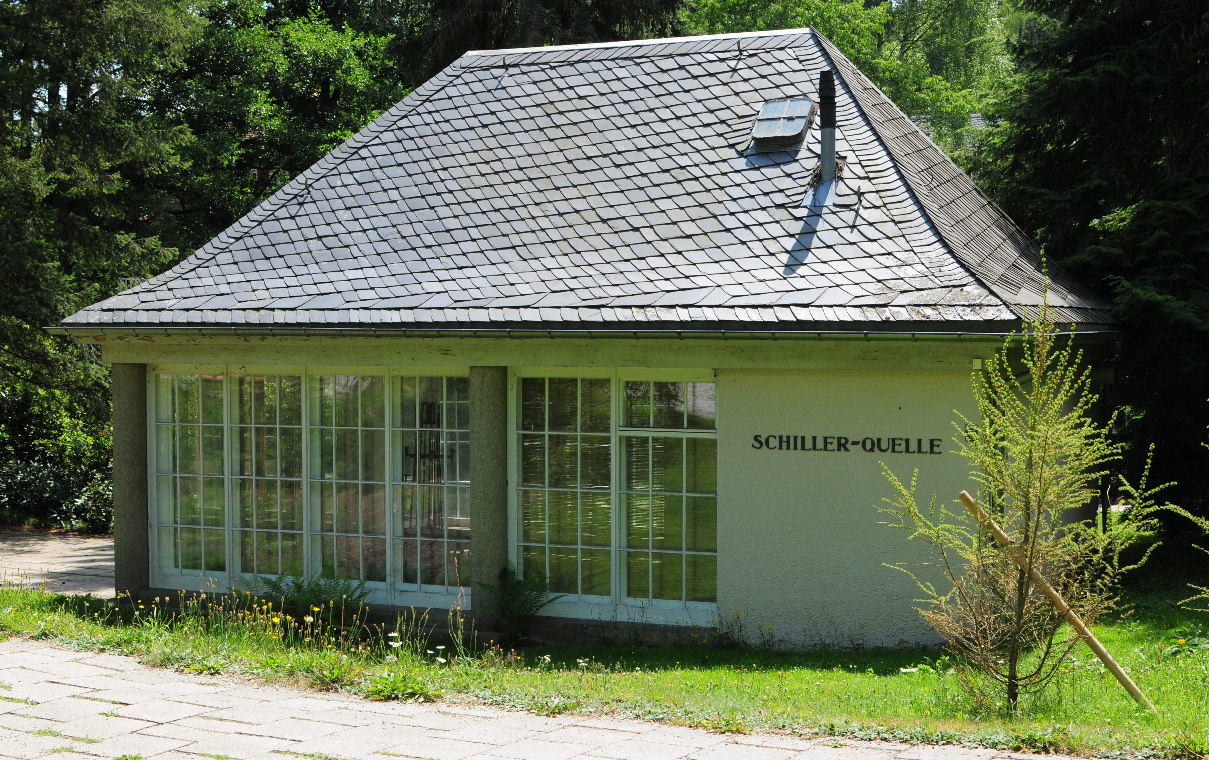 Gemeinde Bad Brambach, Kurpark Bad Brambach, Schillerquelle (Vogtlandkreis, Freistaat Sachsen, Deutschland)